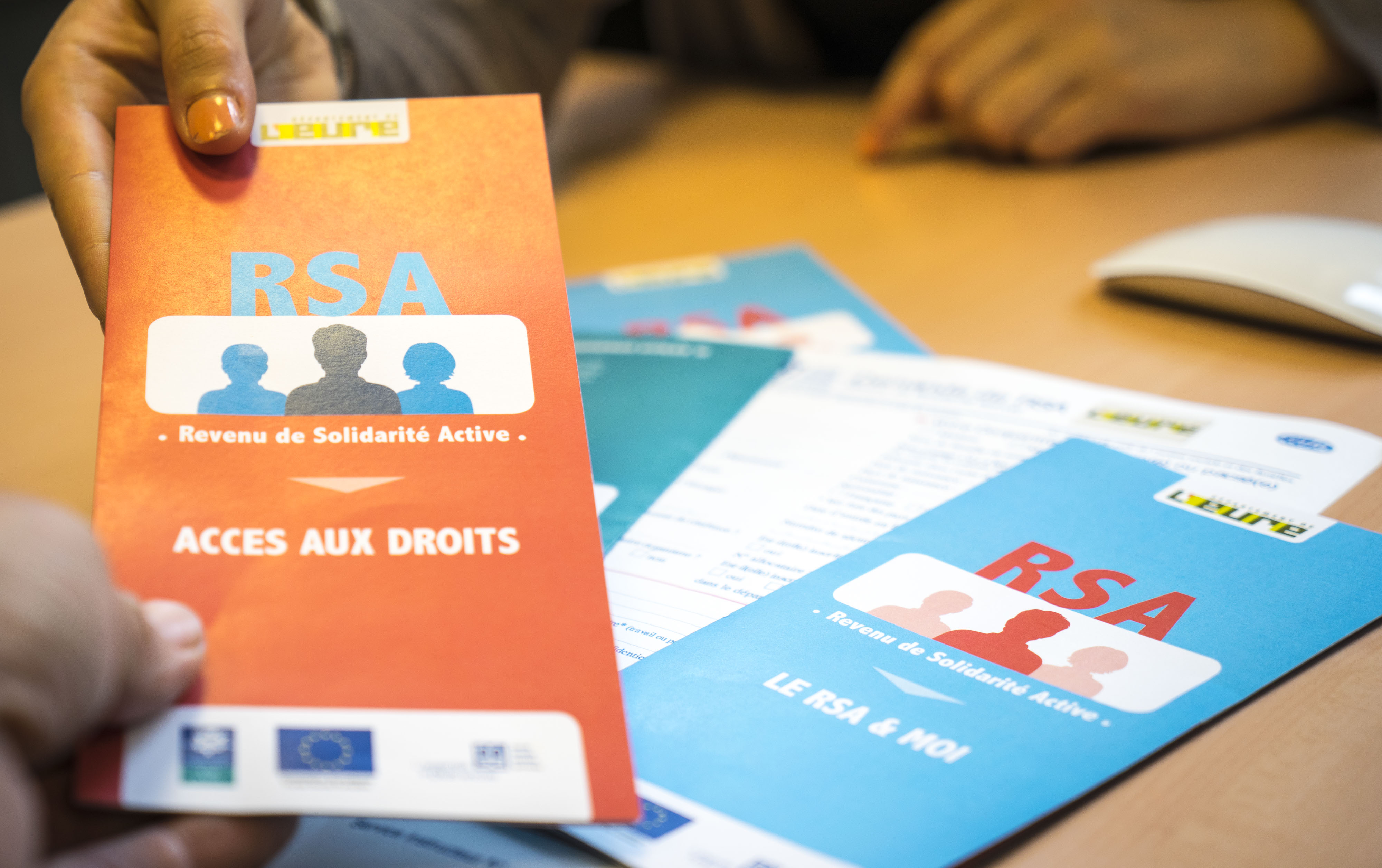 Plaquette du Revenu de solidarité active réalisée par le conseil départemental de l'Eure